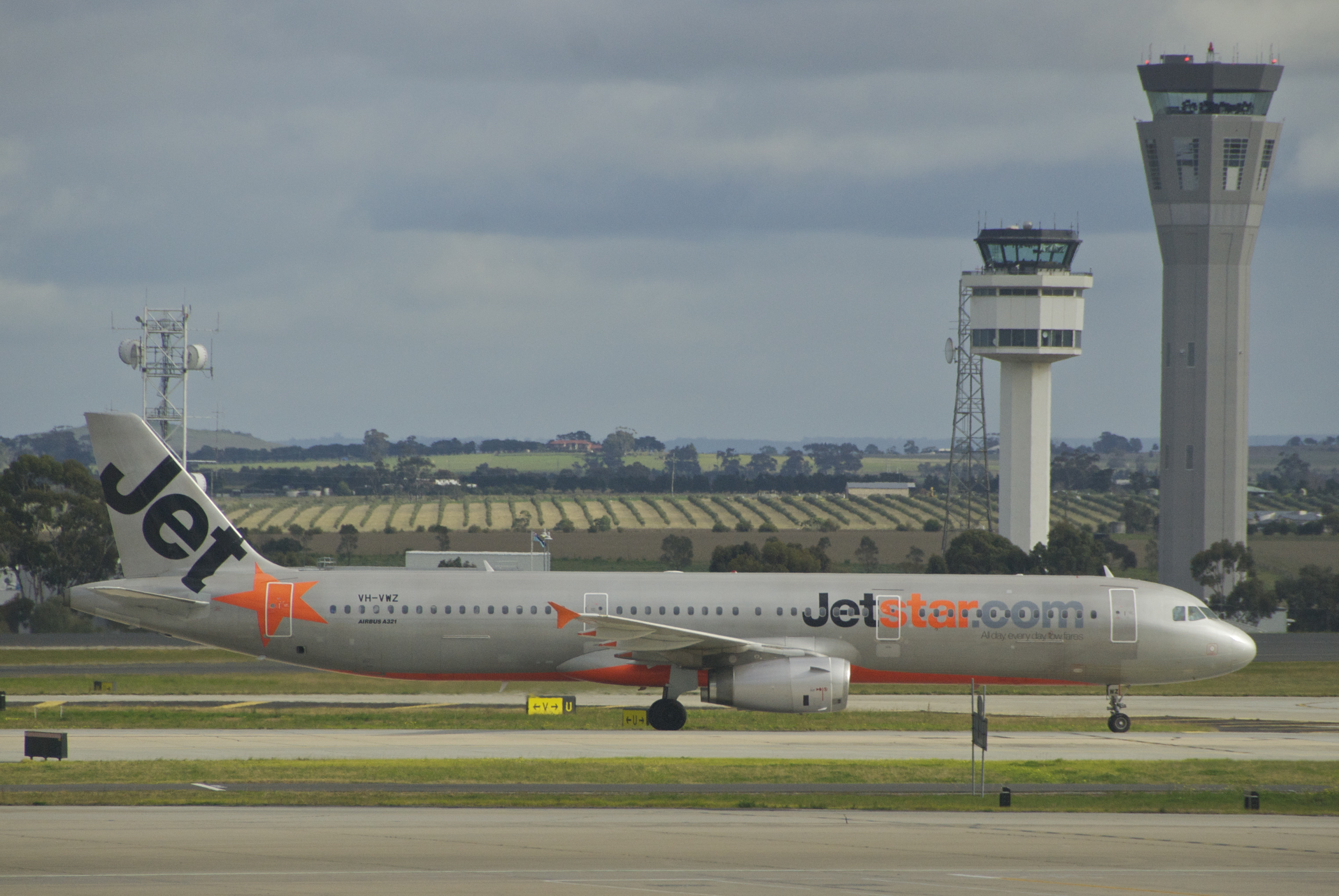 Jetstar Airbus A321-231; VH-VWZ@MEL;29.07.2012/664bc